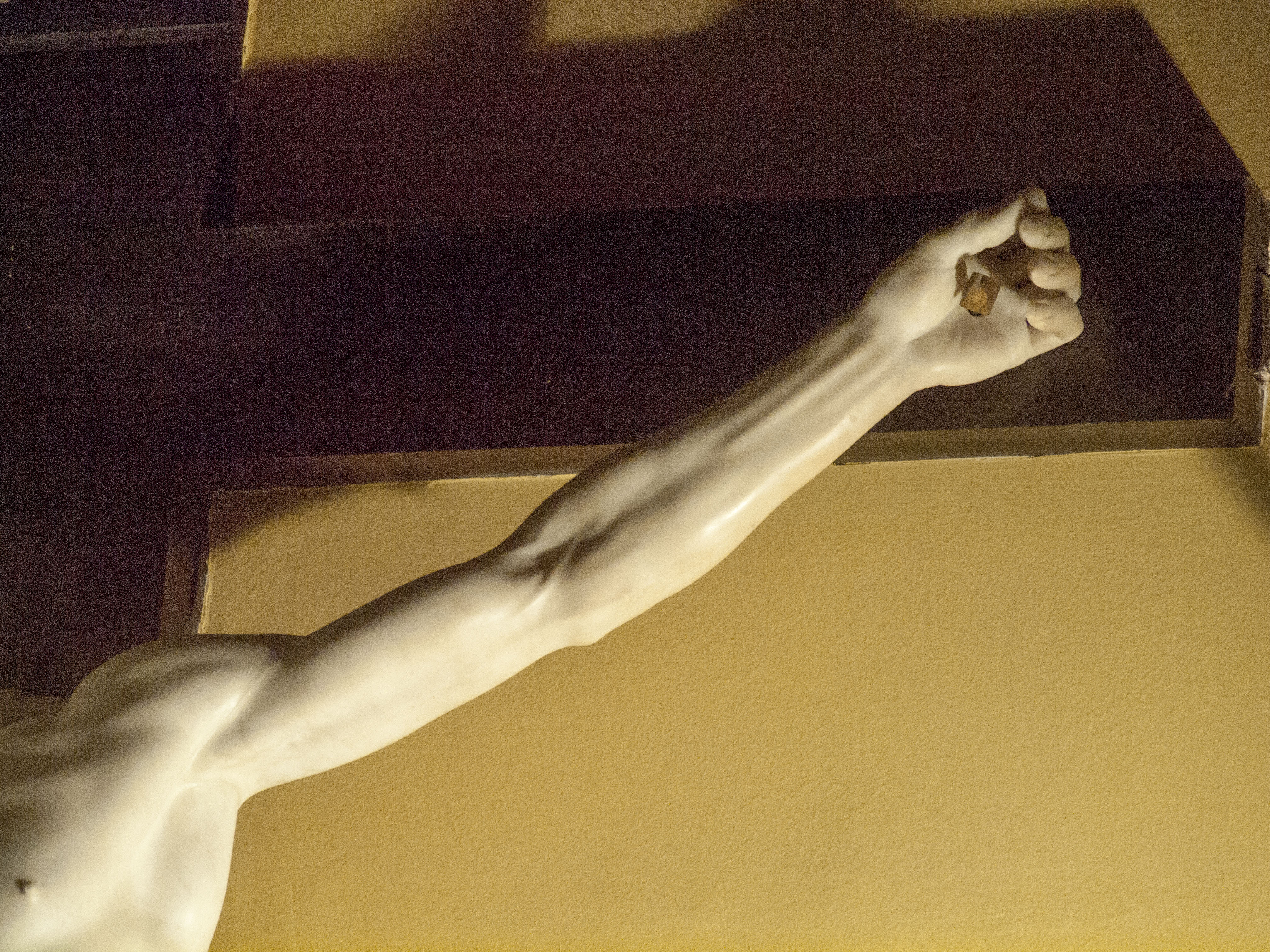 Cellinik bere hilobirako egindako kruxifijoa eta Felipe II eskuetan bukatu zen. Biluzik dagoen Kristo bakarrenetako bat, arastasun ohiala badu ere.